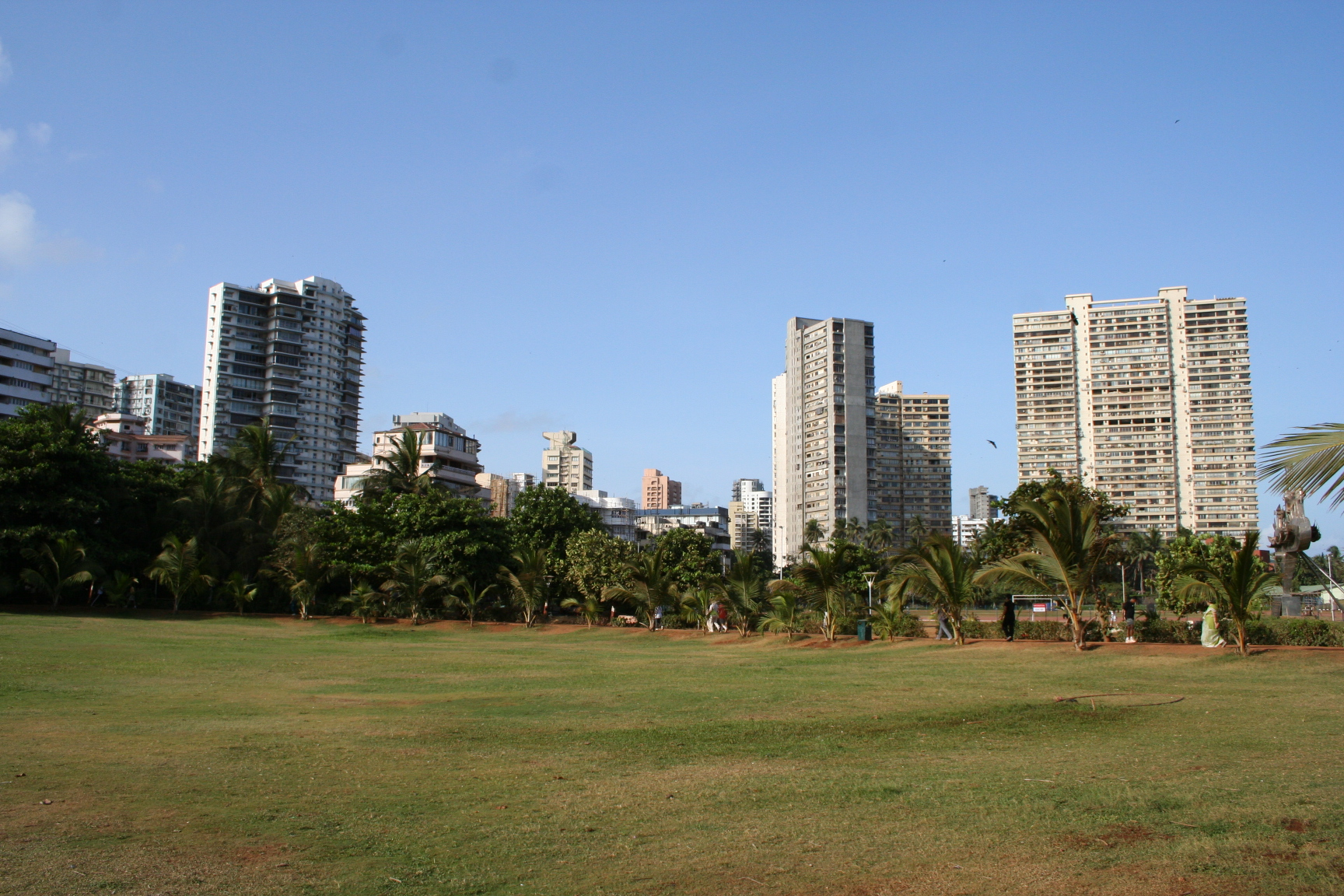 Priyadarshini Park at Nepean Sea Road.